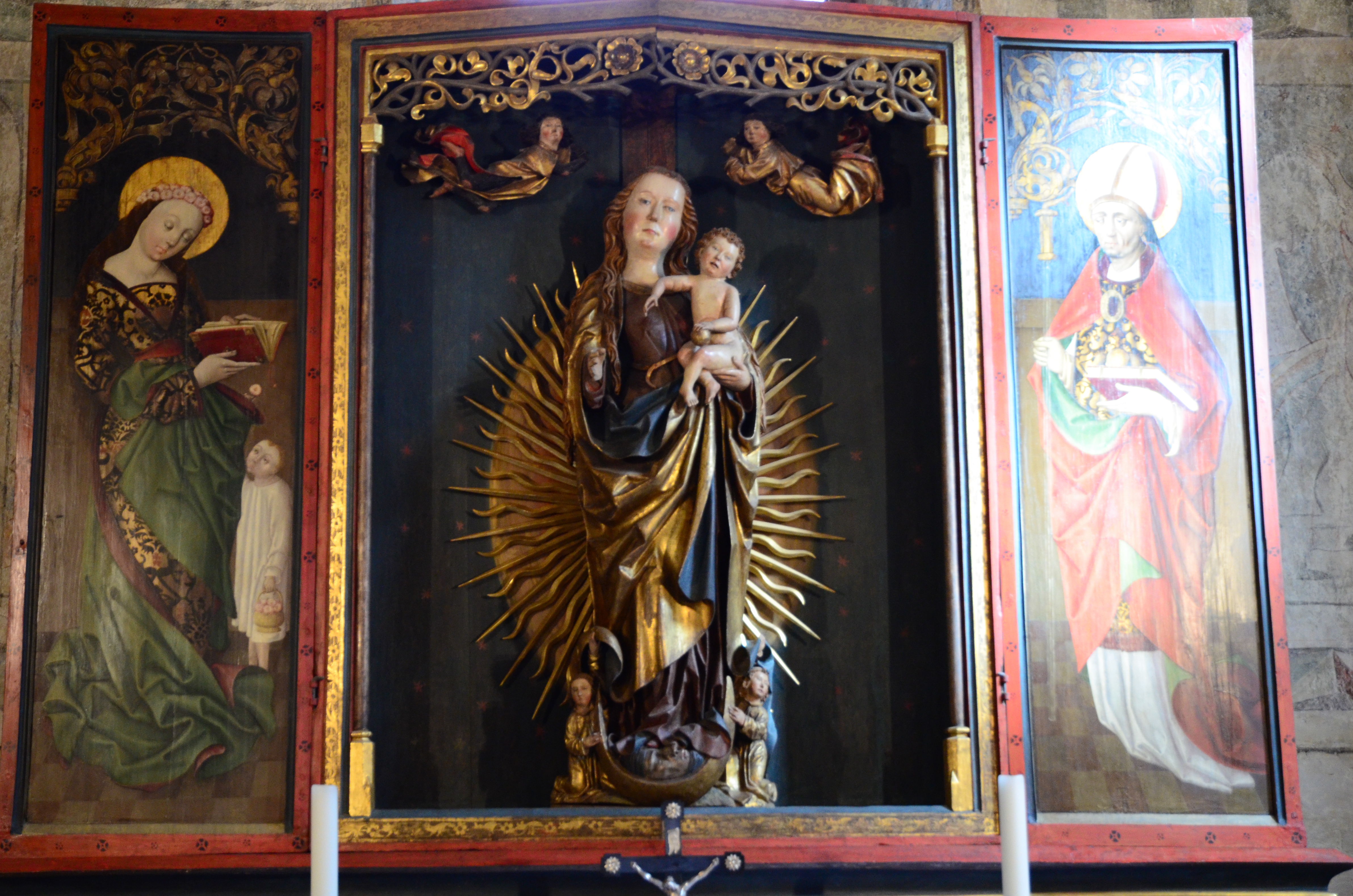 Spitalirche in Dinkelsbühl, Innenausstattung